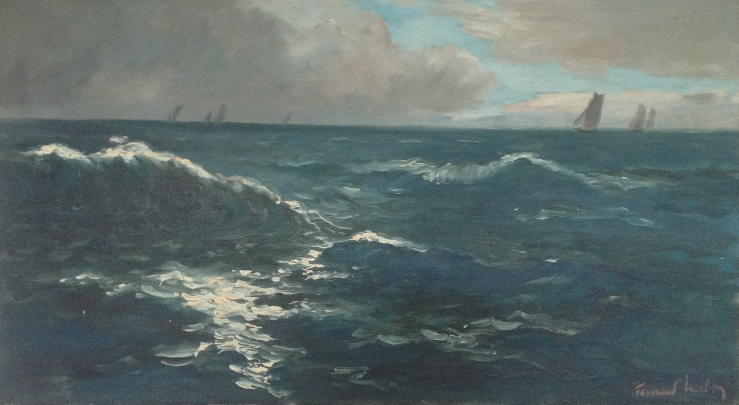 Marine, Huile sur toile signée "Fernand Herbo" H : 45 cm - L : 81 cm